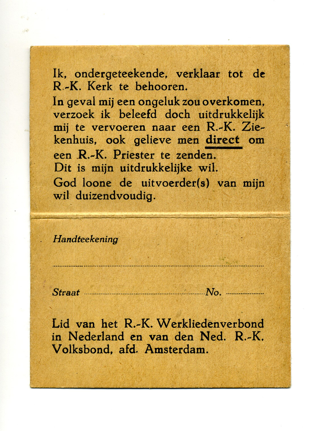 Legitimatie R.- K. Werkliedenverbond in Nederland en van den Ned. R.- K. Volksbond, afd. Amsterdam. Afmeting 10x8cm